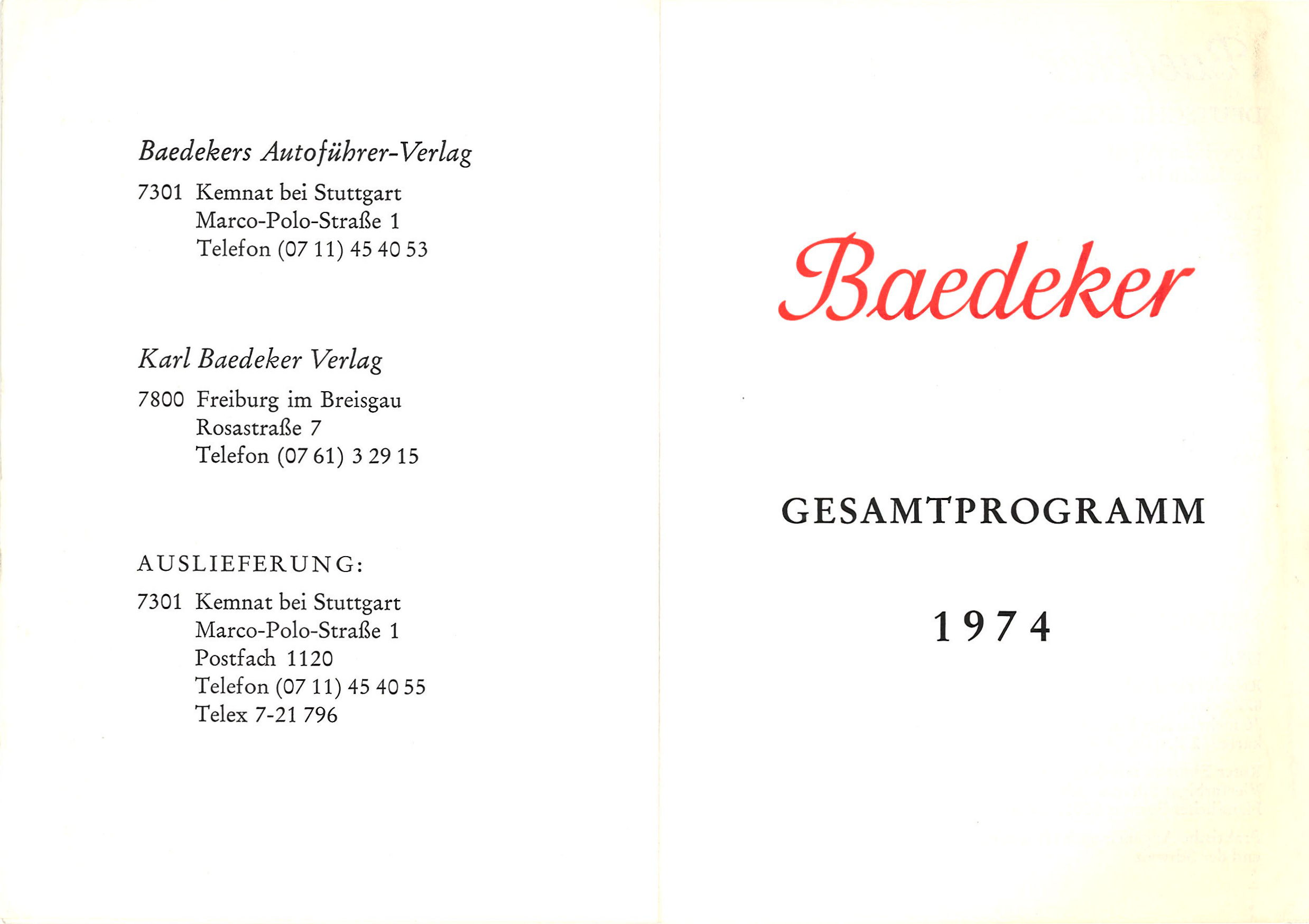 Gesamtverzeichnis des Baedeker Verlags 1974